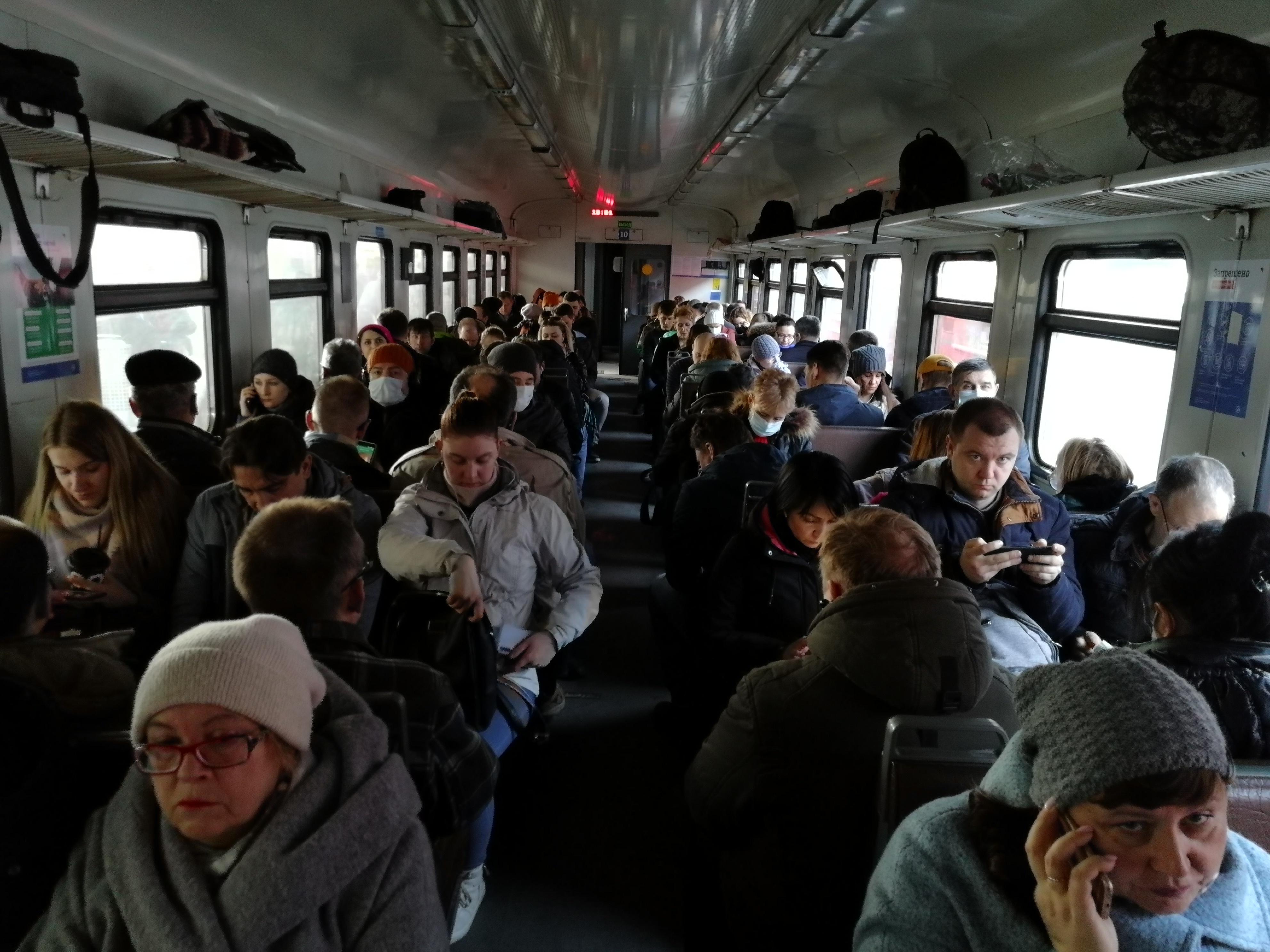 Люди на улицах Москвы и в метро 25 марта 2020 года во время пандемии COVID-19